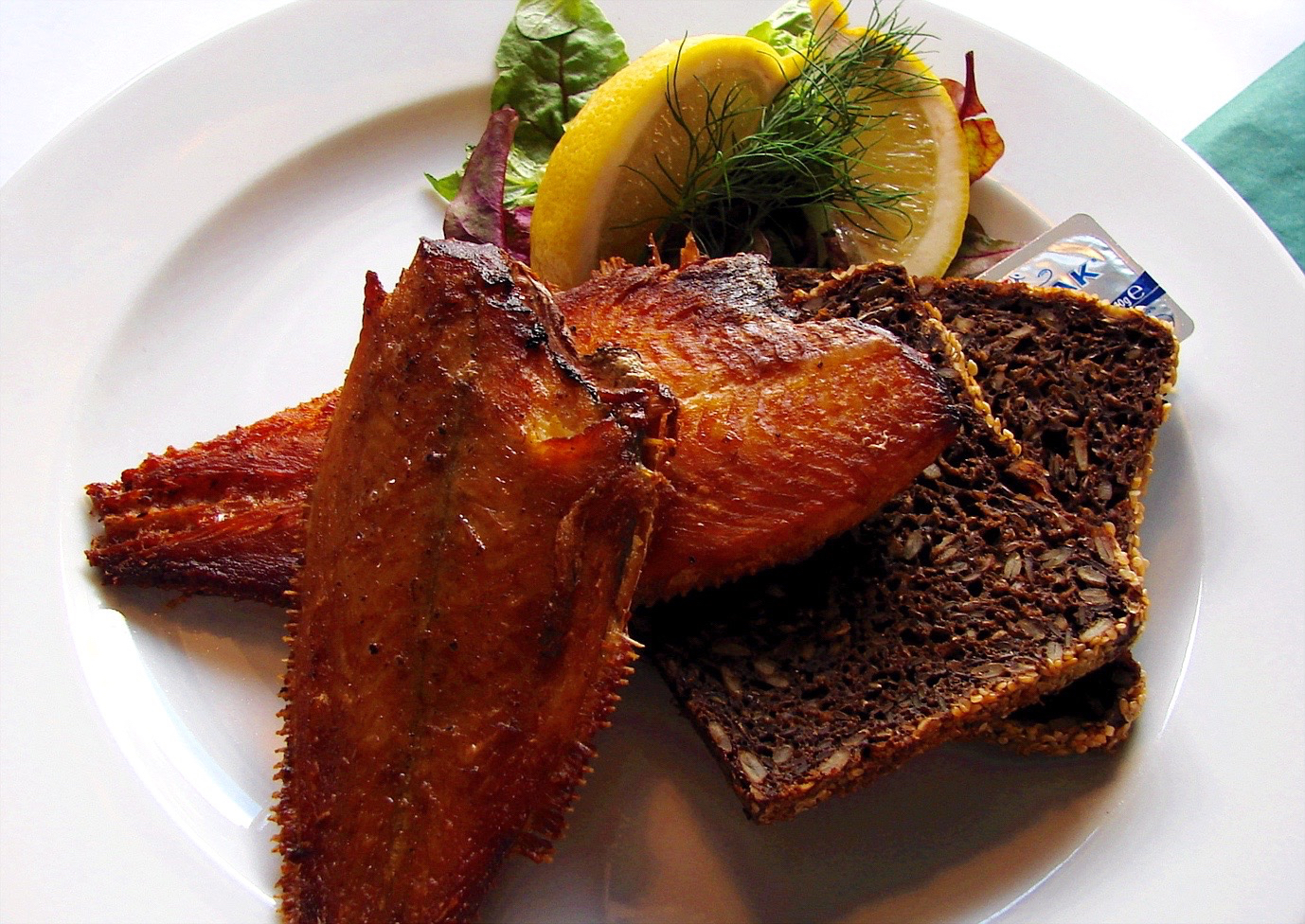 Bakskuld med rugbrød fra det vestlige Jylland, Danmark